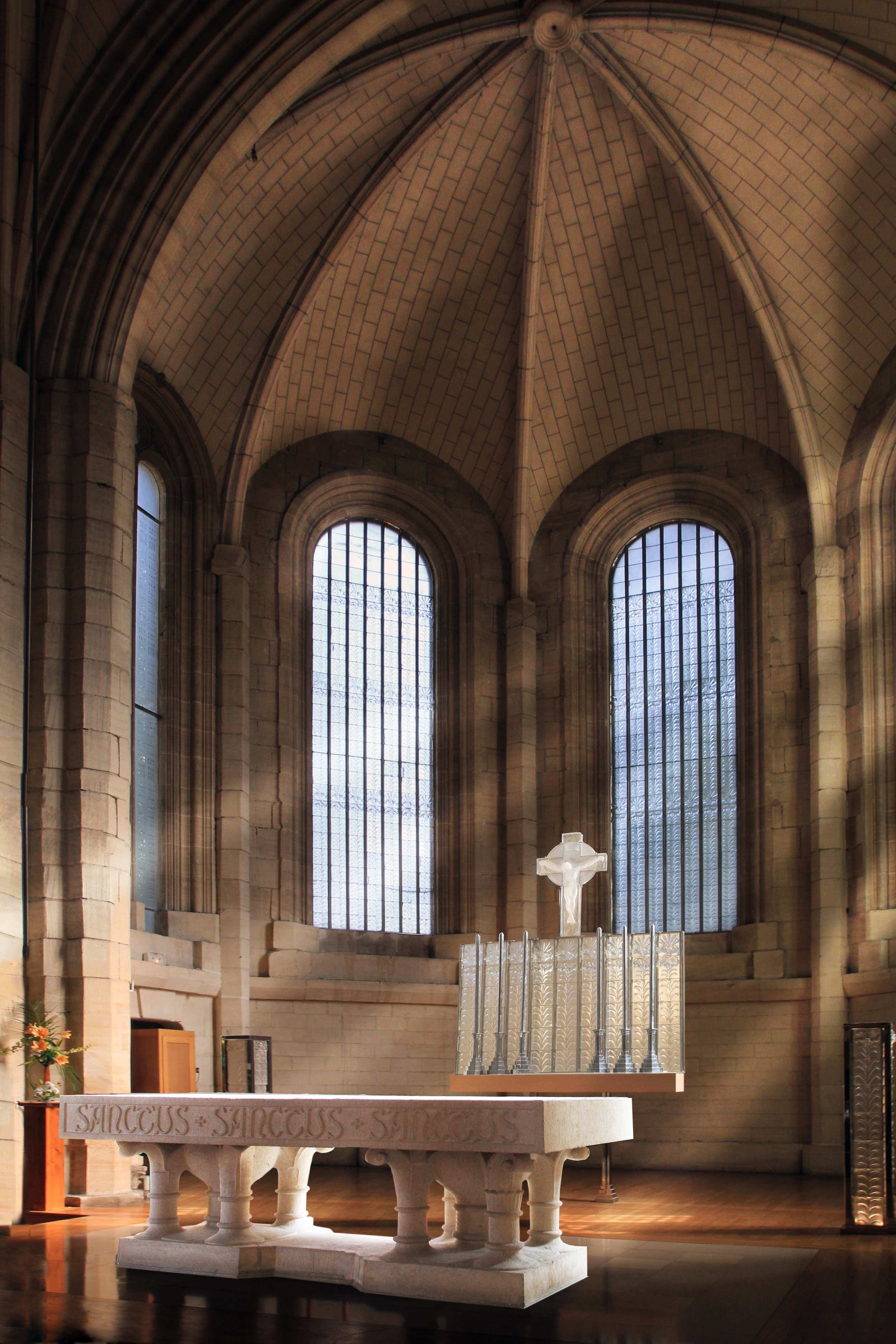 Notre Dame de Fidélité - La chapelle Lalique - Douvres la Délivrandes ( 14 ) Le Christ de verre et le retable, oeuvres du maître-verrier René LALIQUE ( 1931 ) . La chapelle porte son nom . .